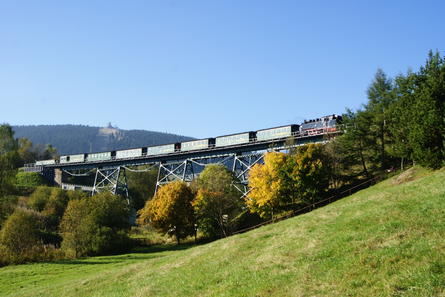 99 794 auf dem Hüttenbachtalviadukt Oberwiesenthal